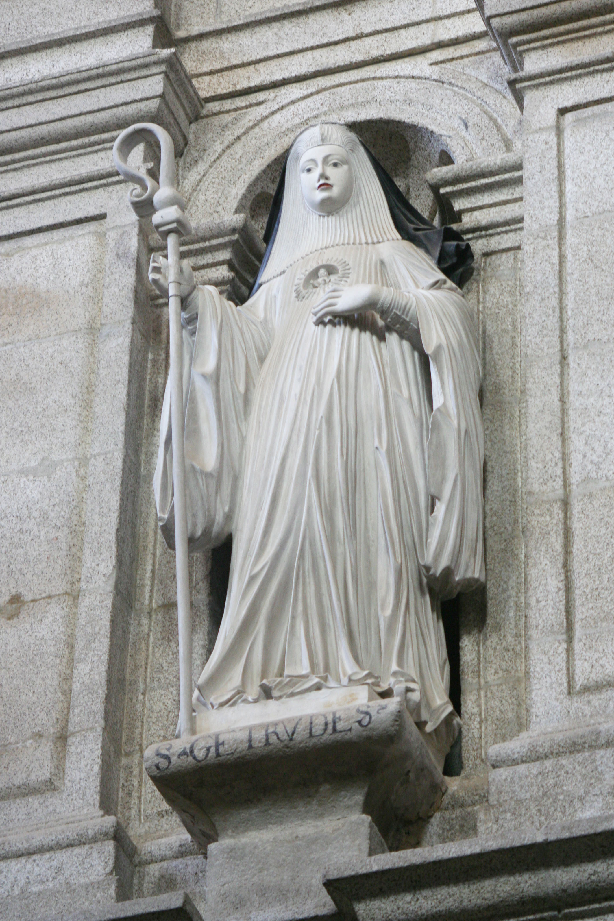 Escultura em pedra de Ançã do Mosteiro de Arouca.